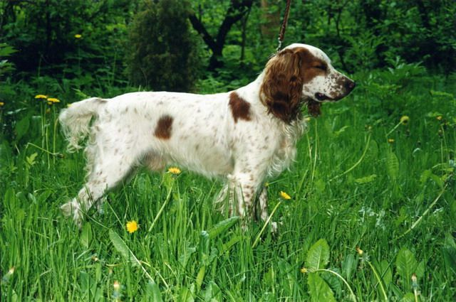 A Russian Spaniel